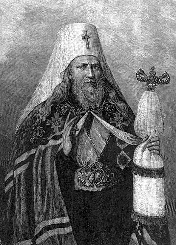 Engraving of Gavril Bănulescu-Bodoni, Orthodox cleric, metropolitan of Moldavia, Kiev, etc.